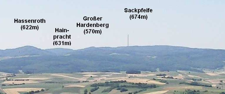 Die Sackpfeife (674m) und die zum gleichnamigen Naturraum gehörigen Großer Hardenberg (570m), Hainpracht (631 m) und Hassenroth (622m) vom Christenberg im Burgwald aus; im Vordergrund die Wetschaft-Senke